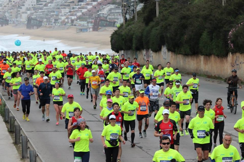 Foto de la Maratón de Viña del Mar 2013